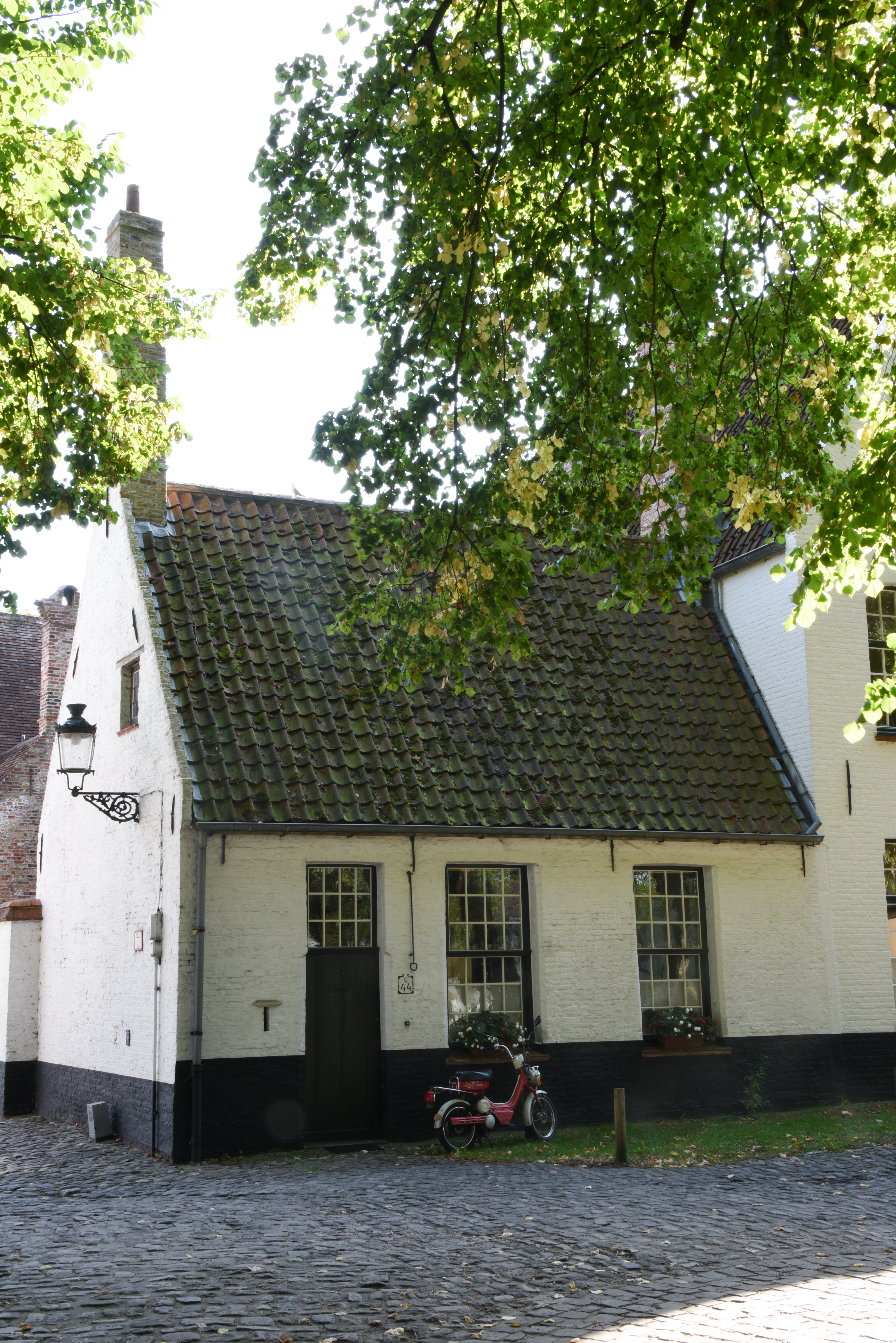 Breedhuis